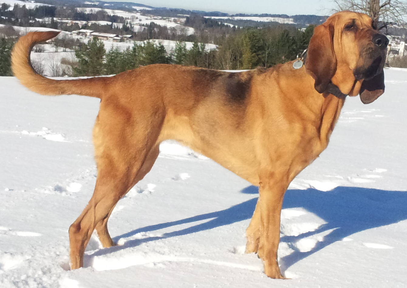 Bloodhound